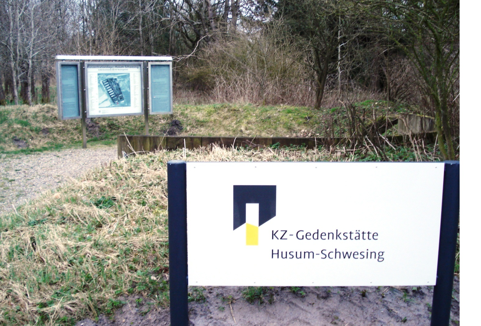 KZ-Husum-Schwesing - Gedenkstaette